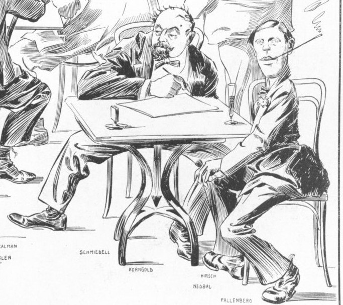 Zygmunt Skwirczyński Julius Korngold Max Pallenberg (rechts) 1911